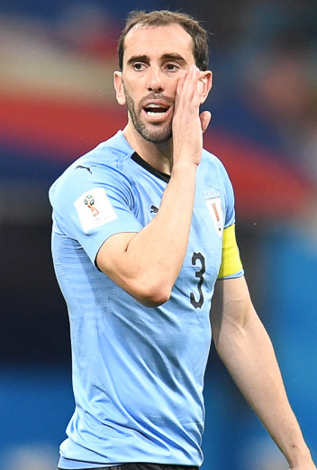 День, когда Роналду попрощался с ЧМ. Кавани и Суарес идут дальше